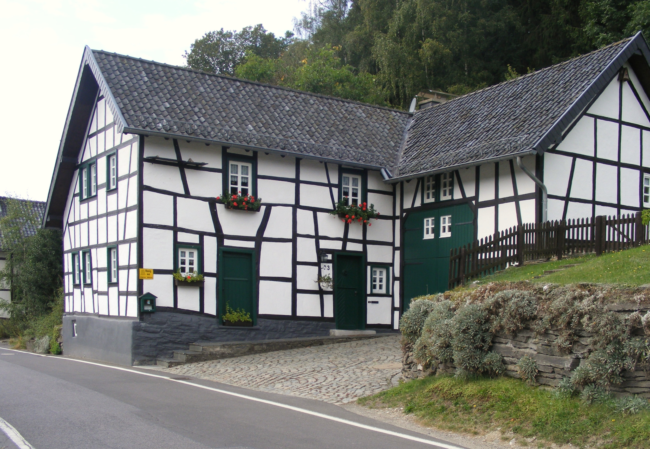 Simmerath Hammer Dedenborner Str 33This is a photograph of an architectural monument., no. 15